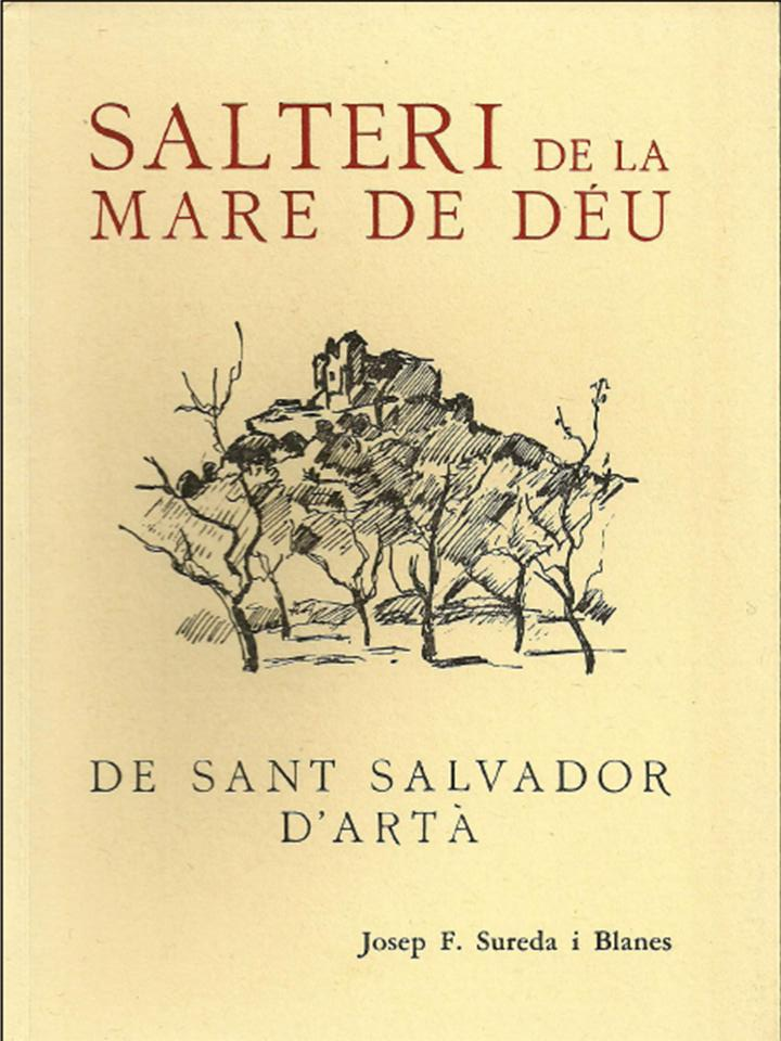 Fotografia de la portada del Salteri de la Mare de Déu de Sant Salvador